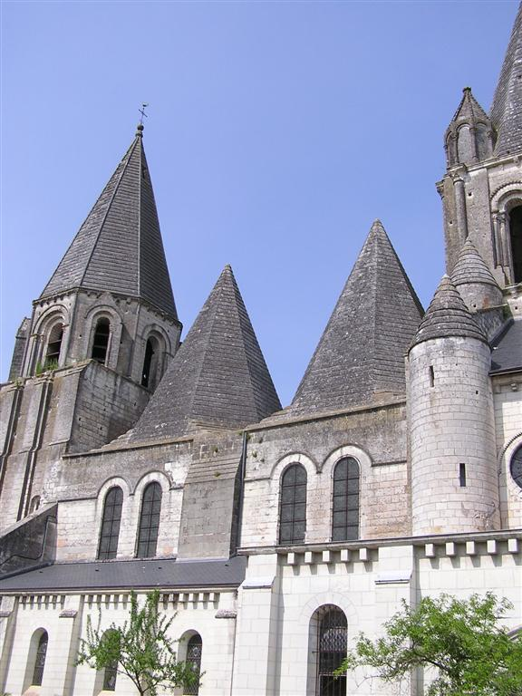 Loches collégiage St-Ours